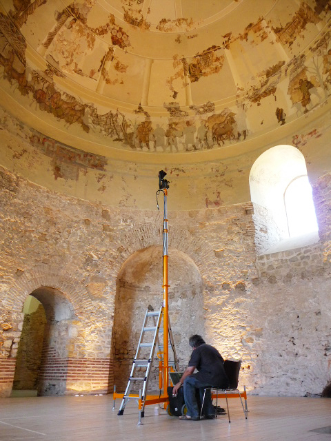 Cúpula de Centcelles durant sessió fotogràfica